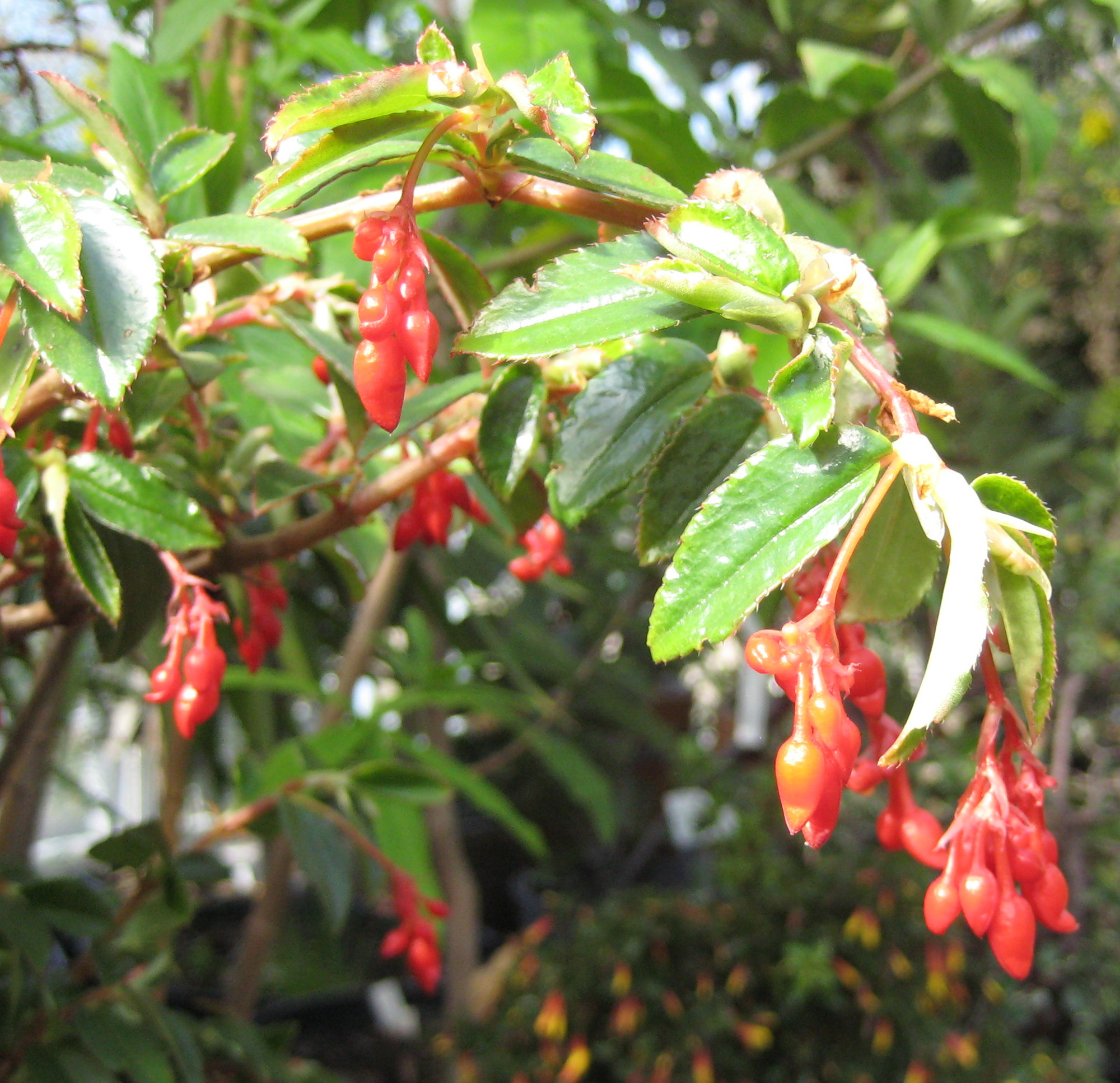 Begonia fuchsioides im Botanischen Garten Dresden